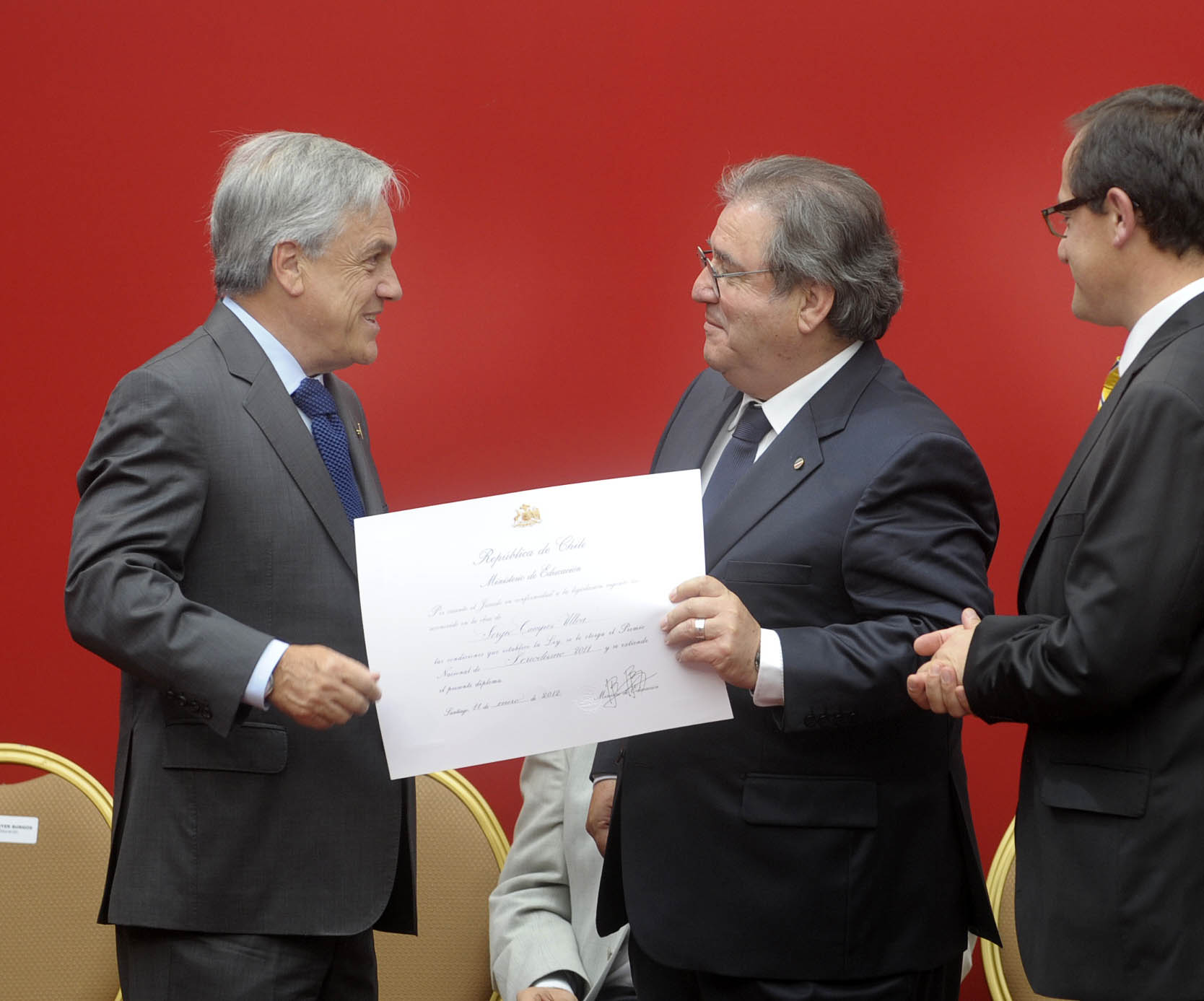 11-01-2012 Entrega premios nacionales